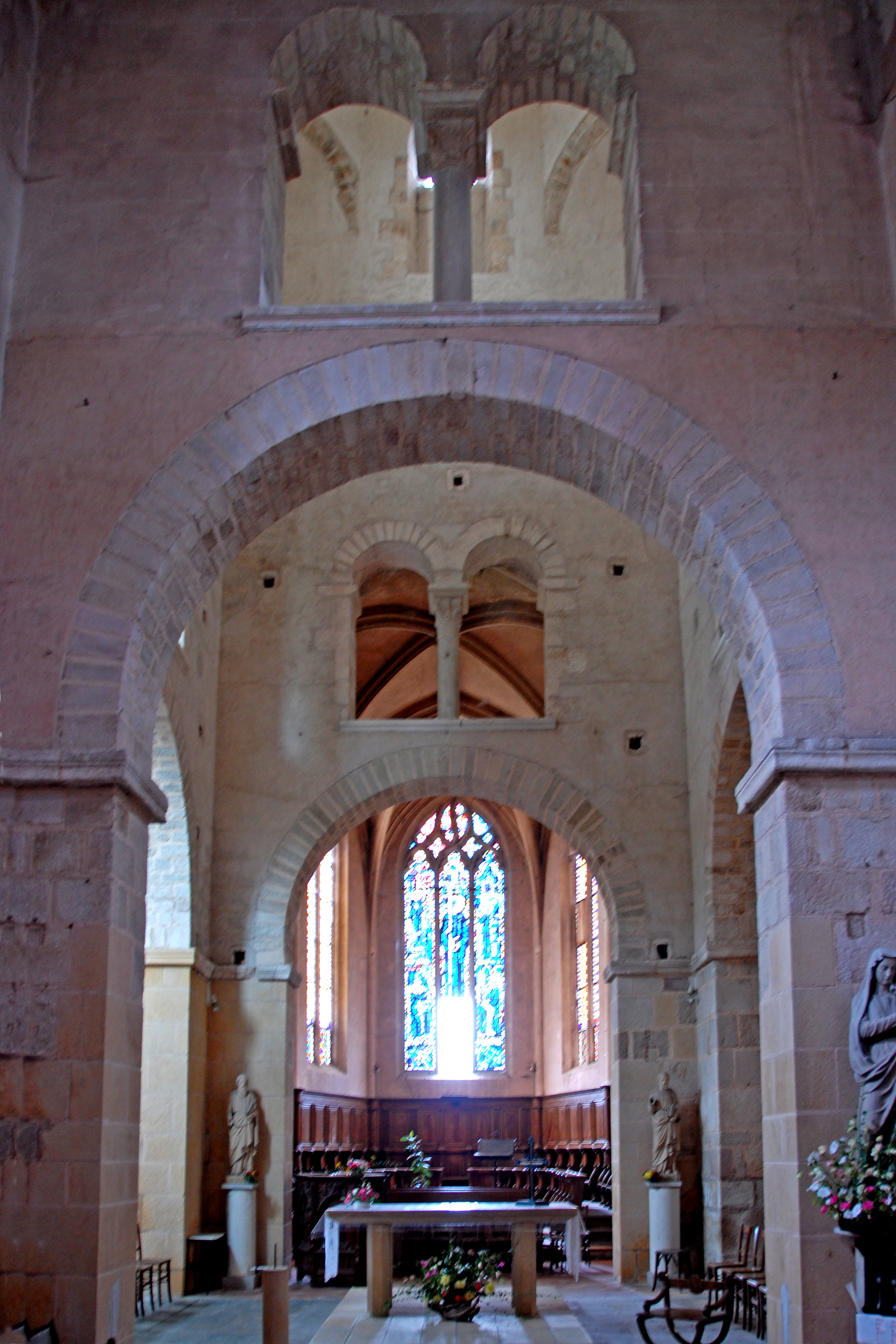 Prioratskirche, Vierung u. Chor, aus Langhaus